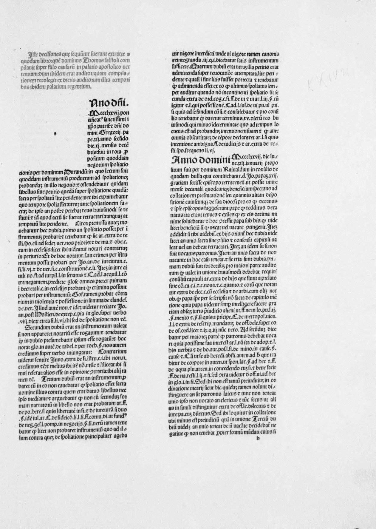 Carta b1r